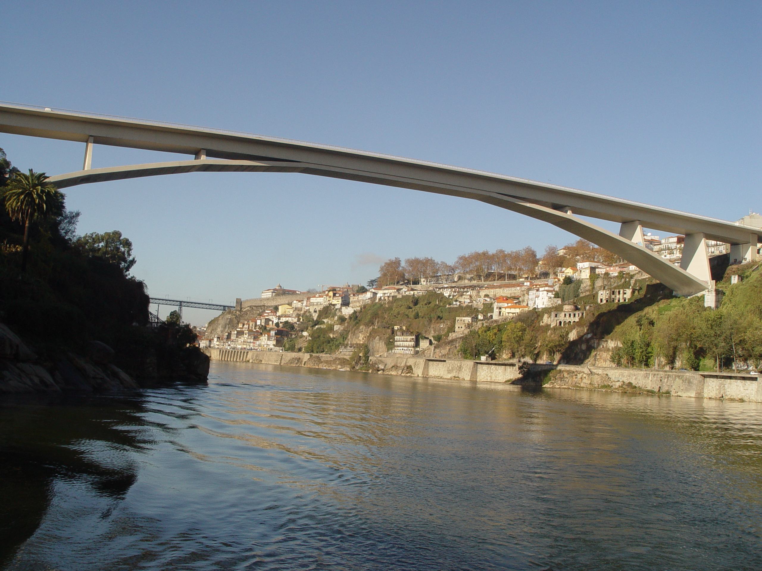 Infante Bridge in Porto Portugal